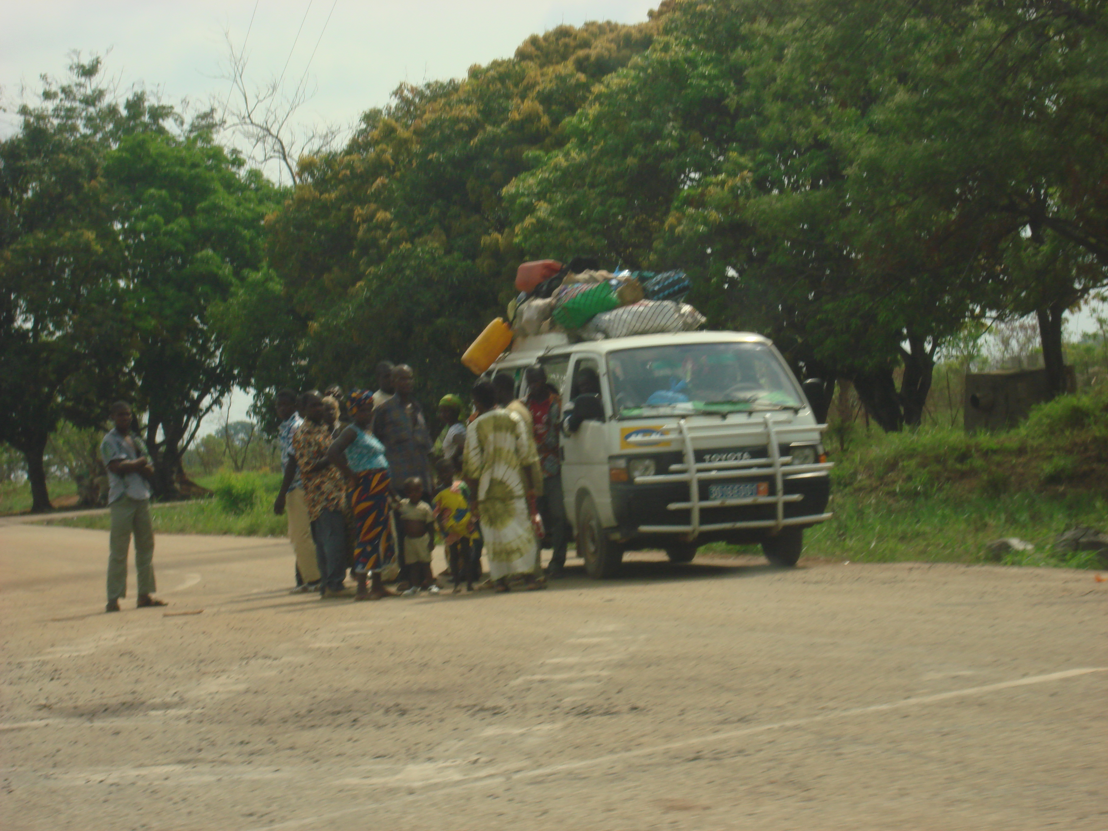 Minicar de transport de passagers sur l'axe Bouaké-Yamoussoukro (Côte d'Ivoire)